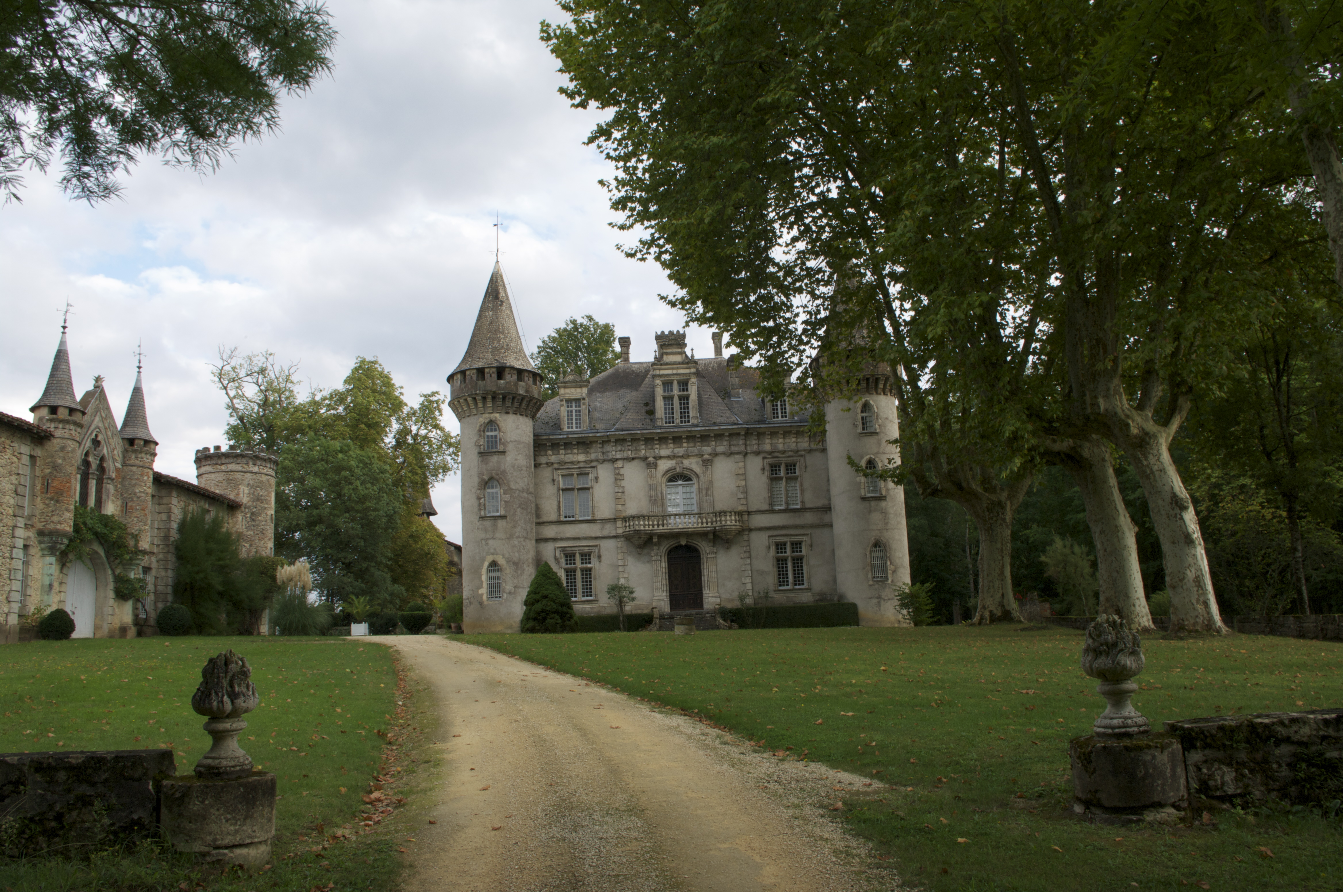 Le château de Fondat est situé dans le département français des Landes (40), sur la commune des Saint-Justin en France. .